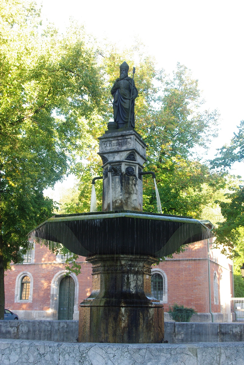 Alte Saline, 83435 Bad Reichenhall (u.a. Bauensemble E-1-72-114-9) zugehöriger Rupertusbrunnen im nördlichen Innenhof, Brunnenanlage von Michael Johann RudholznerThis is a photograph of an architectural monument.